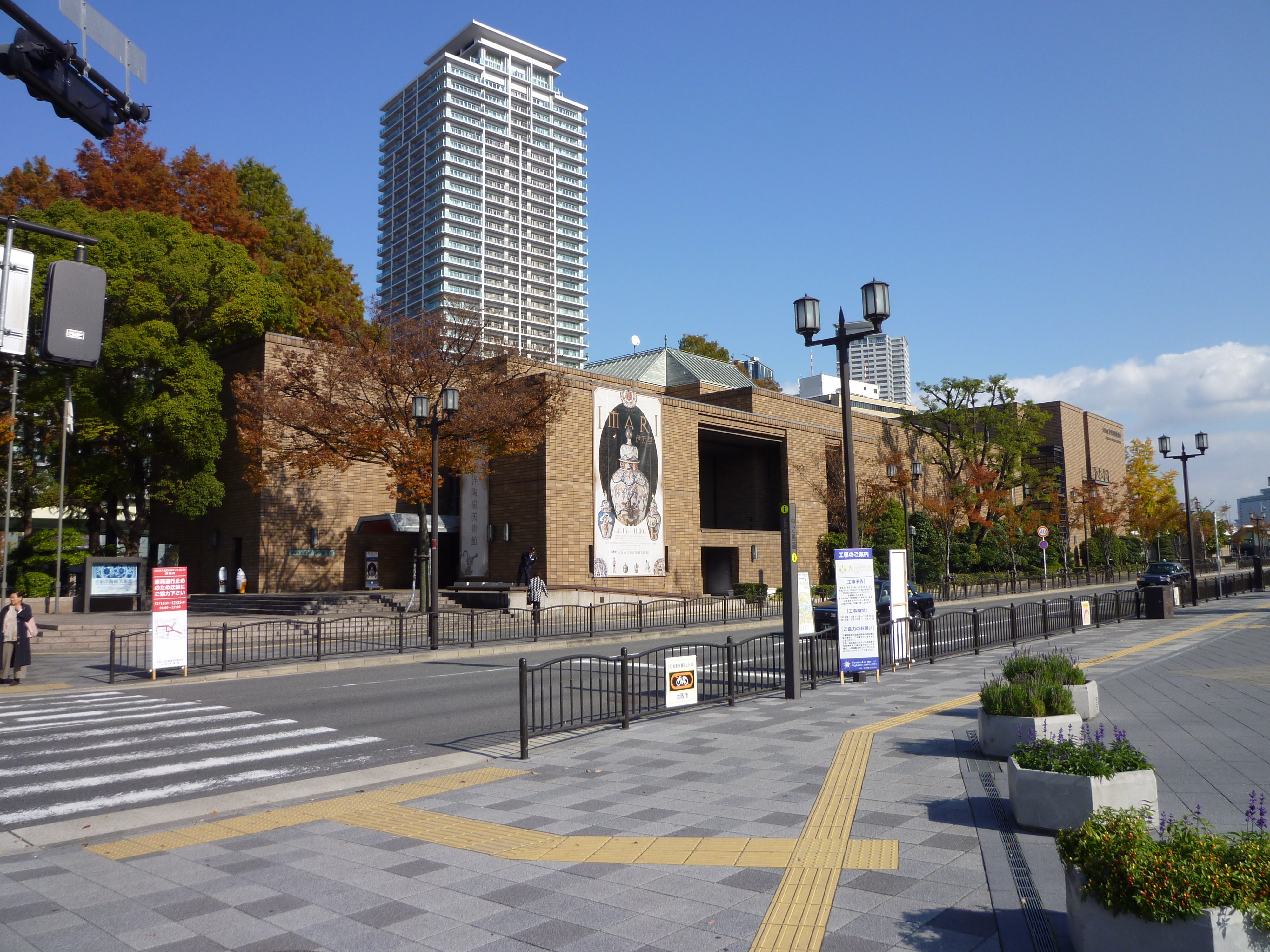 大阪市立東洋陶磁美術館